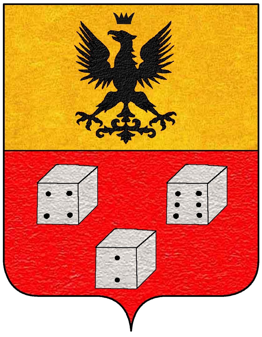 Stemma della famiglia Quadrio